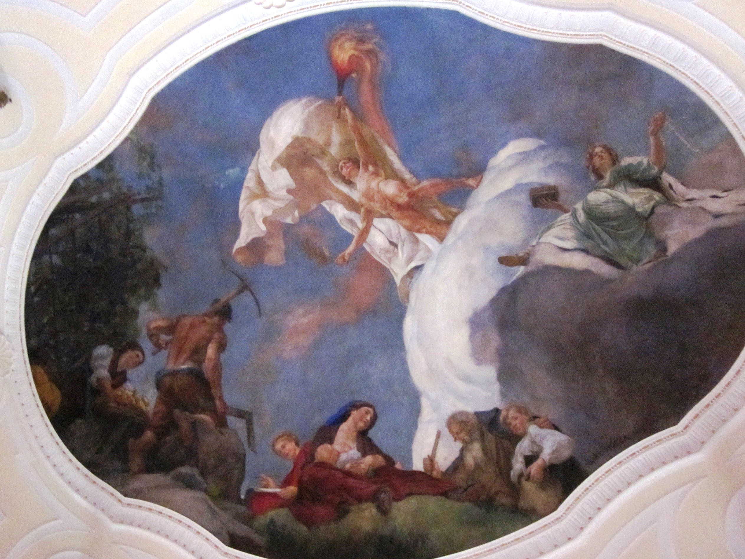 Gemeinderatssaal in Bozen - Deckengemälde von Gottfried Hofer mit nationalliberaler Symbolik